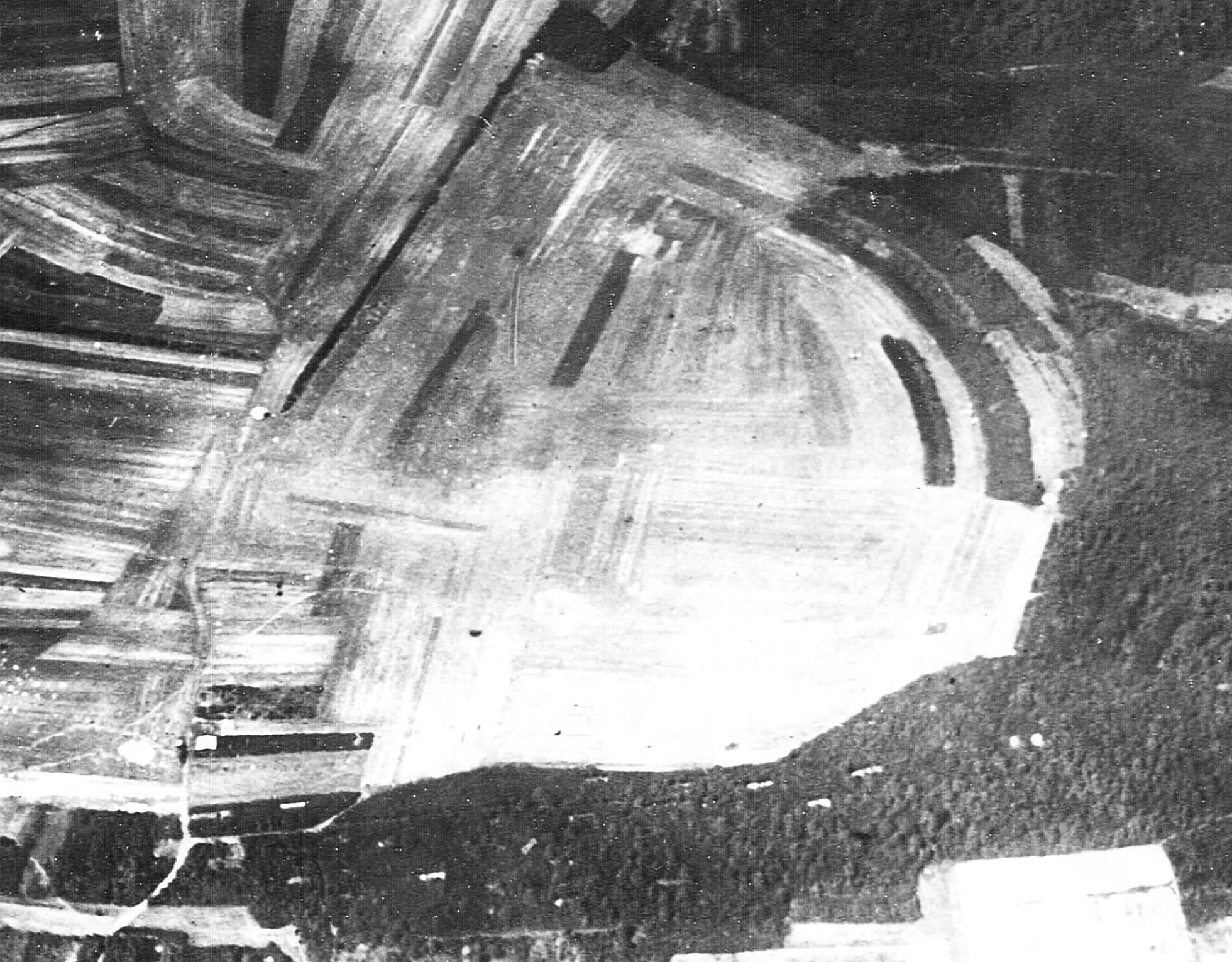 Delouze Aerodrome - Photo